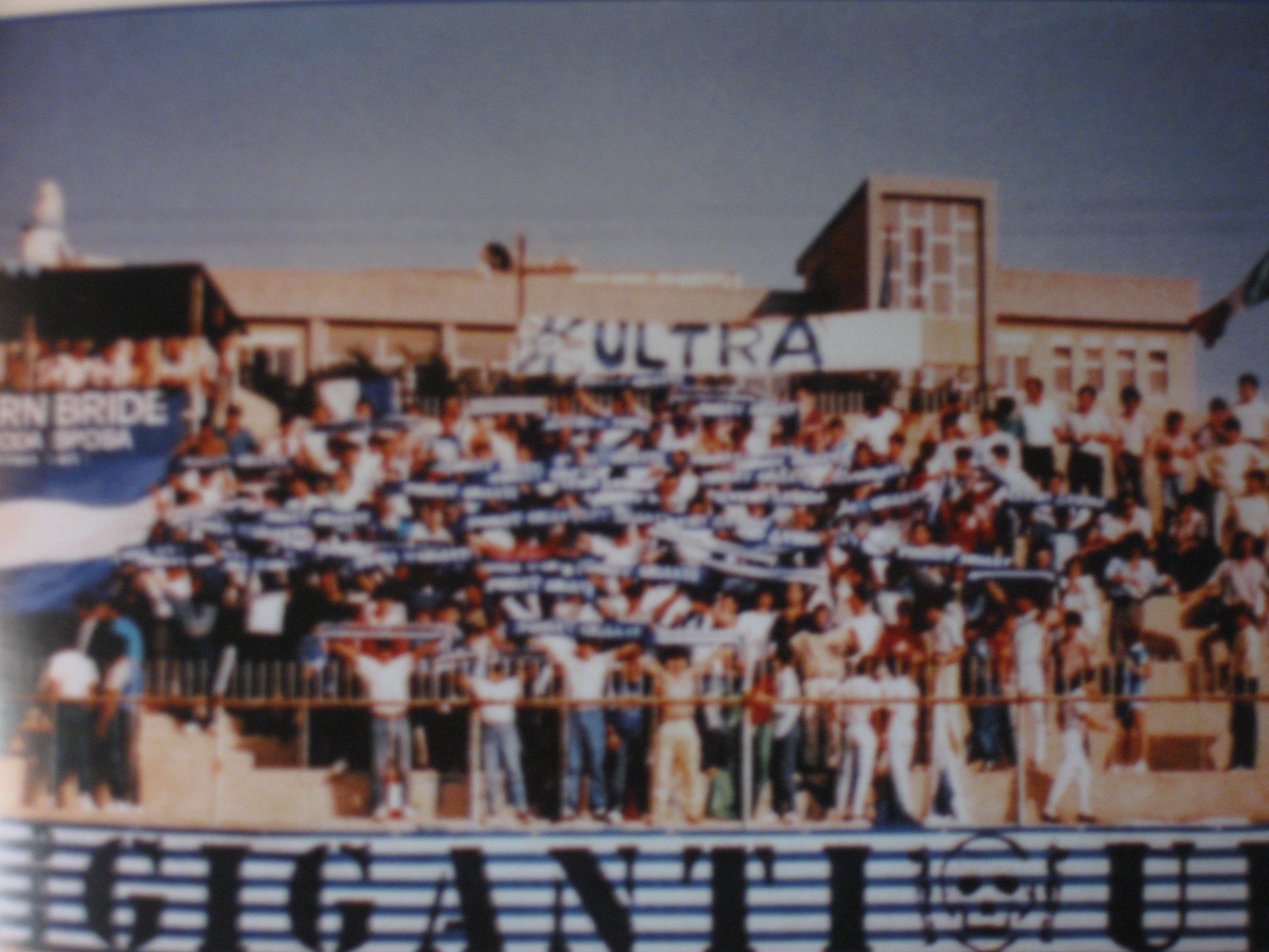 Foto Fossa Dei Giganti anni 80